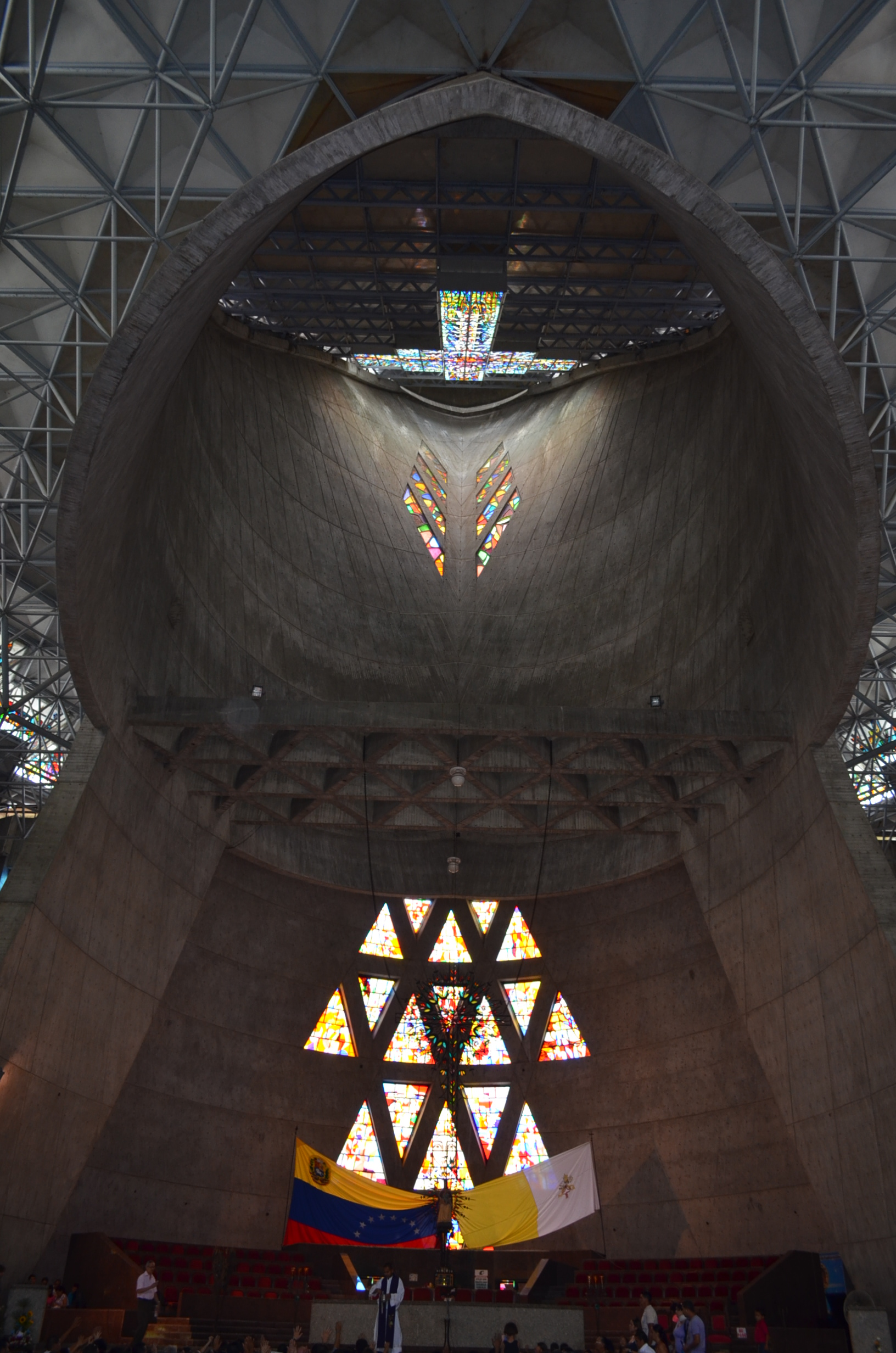 Sangenarodeboconoito, Portuguesa, Venezuela